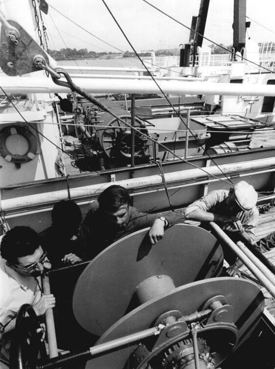 Rostock, Fischkutter für Kuba Zentralbild Sindermann 8.7.70-Rostock: Fischkutter für Kuba-Vier für Kuba bestimmte Fischkutter vom Typ "Havanna", die auf der Elbewerft Boizenburg-Rosslau gebaut wurden, liegen gegenwärtig zur Endausrüstung in der Rostocker Neptunwerft. Mit Fisch prall gefüllte Netze soll diese Winsch einmal aus dem Wasser hieven. Für eine ständige Gewährleistung der Funktionstüchtigkeit sorgen bereits jetzt bei der Erdprobung Antonio Alvarez und Radamas Torge sowie die Rosslauer Schiffsbauer Klaus Schneider und Albin Blechschmidt (vlnr).